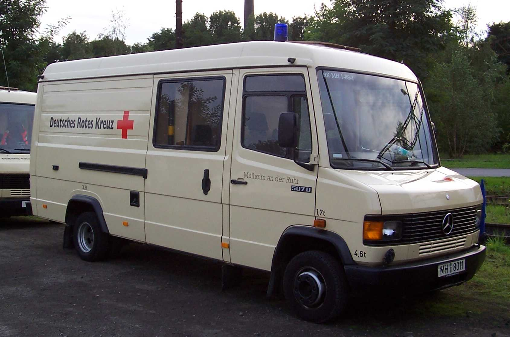 Ein Arzttruppwagen in Duisburg Landschaftspark-Nord des Deutschen Roten Kreuzes Mülheim an der Ruhr